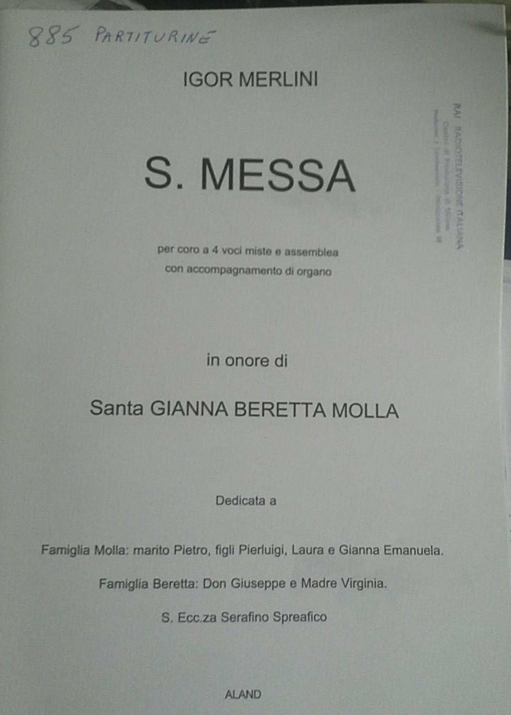 Frontespizio della Messa per la canonizzazione di santa Gianna Beretta Molla composta da Igor Merlini, nell'archivio Rai di Milano.